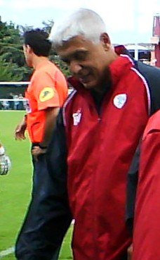 Hubert Velud lors d'un match amical entre l'US Créteil et l'UNFP